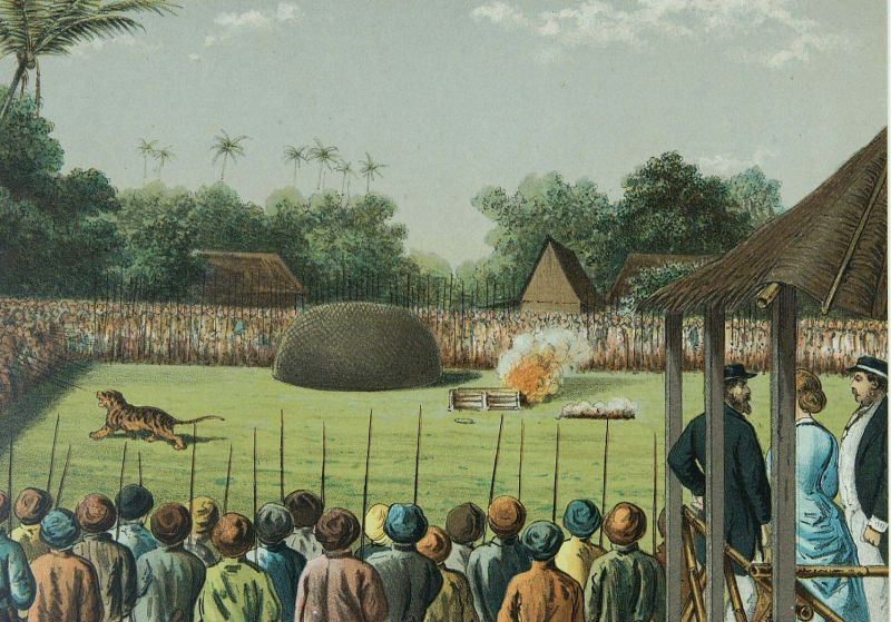 Litho. Kleurenlitho naar een oorspronkelijk werk van Rappard.. Grasveld met tijger en publiek, rampokkan